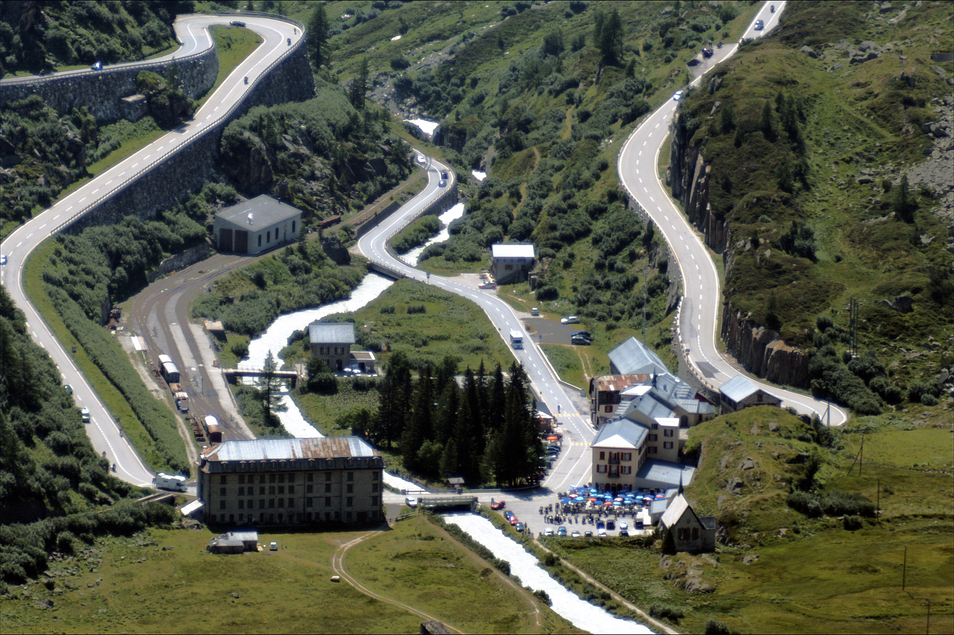 Gletsch aufgenommen mit 300mm Teleobjektiv vom Furkapass. Die linke Strasse führt zum Furka-, die rechte zum Grimselpass.